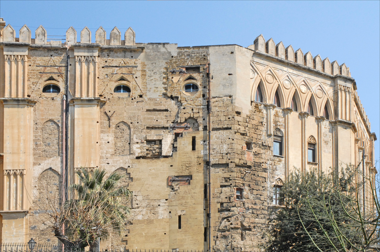 Le palais des Normands a été remanié de très nombreuses fois, il abrite aujourd'hui le siège du Parlement sicilien Ce site est occupé depuis l'époque punique, des éléments de remparts carthaginois ont été trouvés dans les sous-sol du palais. A l'époque arabe, se trouvait à cet endroit le palais de l'Emir (Qsar) que les rois normands se sont appropriés et qu'ils ont transformé. Article de Wikipedia sur le palais des Rois Normands